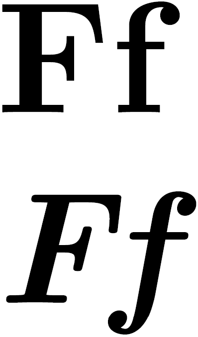 Latin letter F